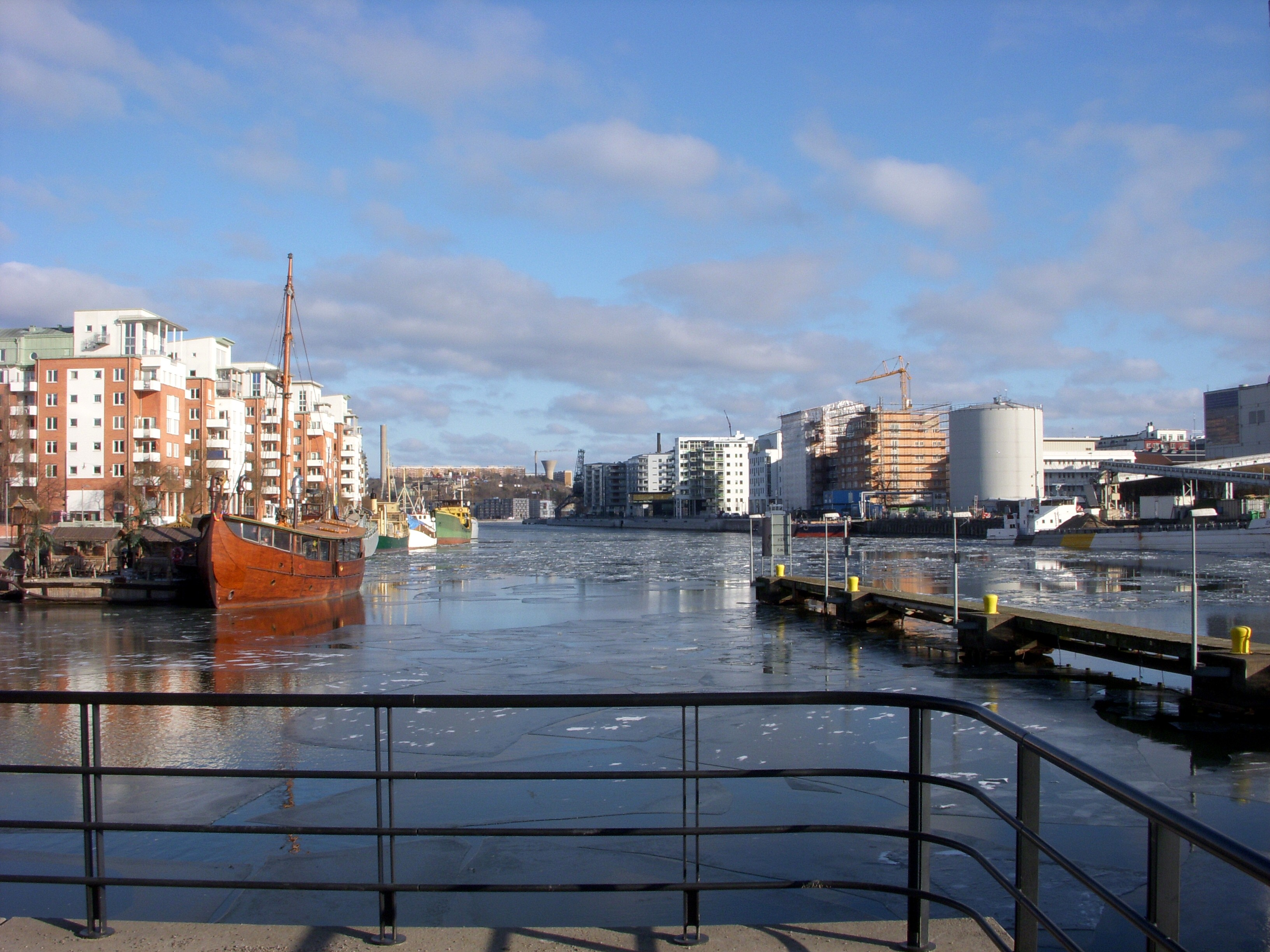 Hammarby sjöstad och Hammarbykanalen i Stockholm